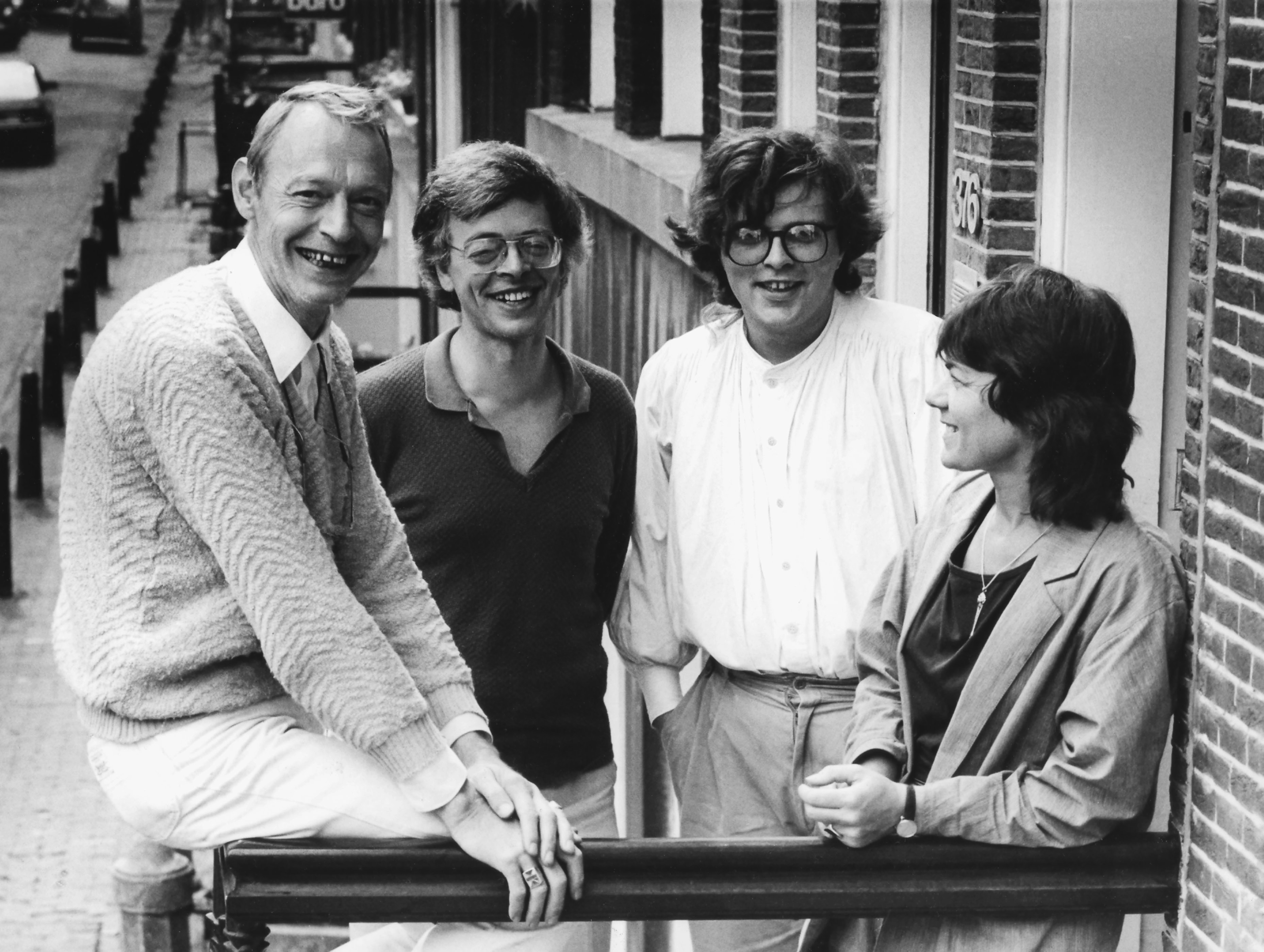 Hoofdredactie van het tijdschrift Bres tussen 1981 en 1984. Van links naar rechts: Simon Vinkenoog, Martin Boot, Tom Ordelman en redactiesecretaresse Faminda Breeuwsma.